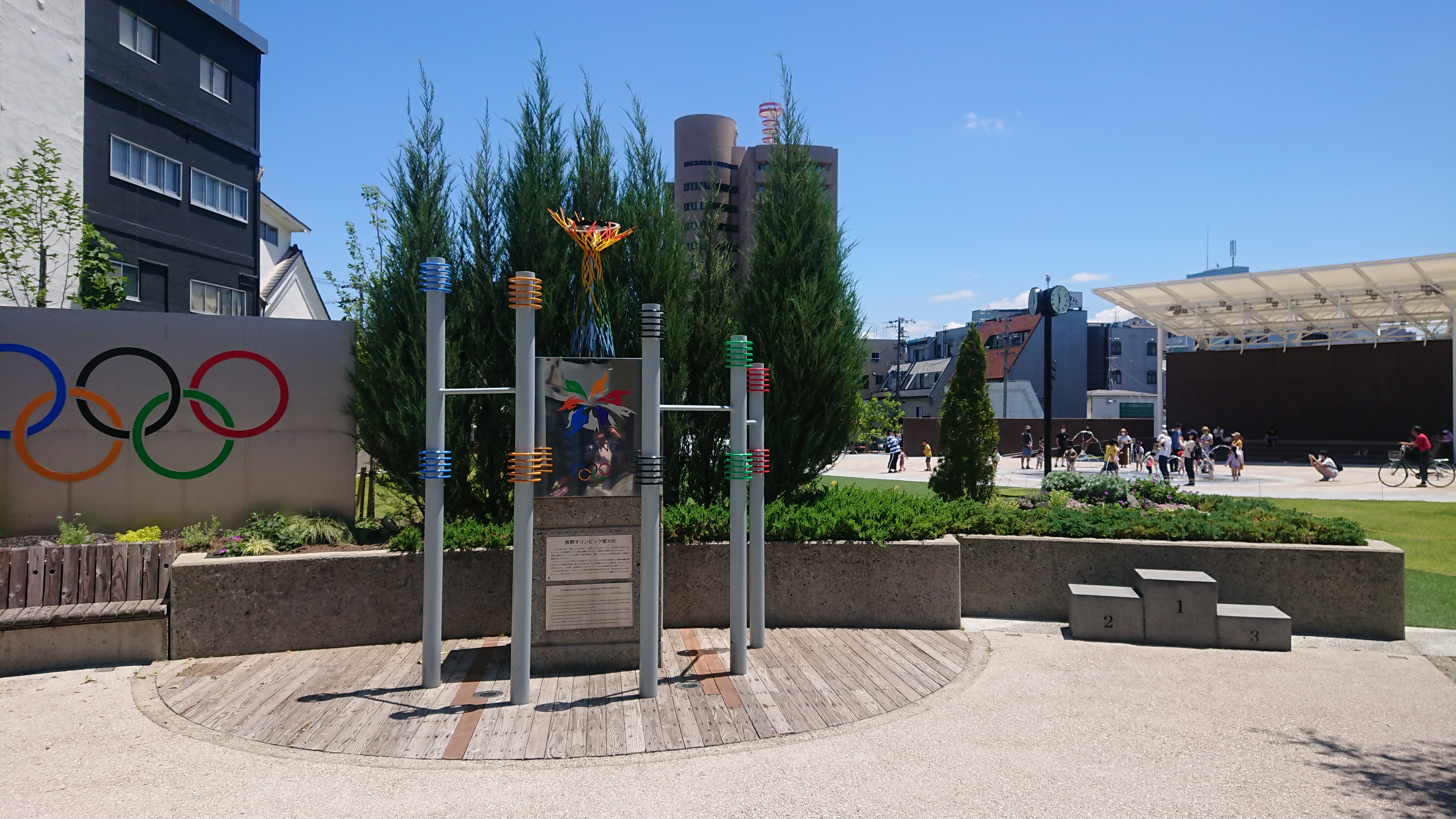 セントラルスクゥエア（中央通り側より撮影）